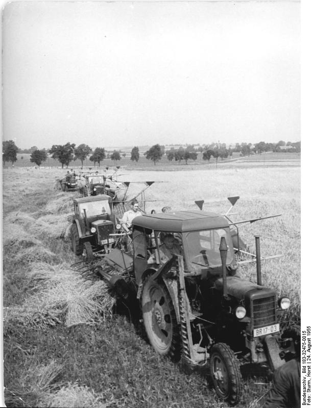 LPG Mestlin-Ruest, Getreideernte ZB-Sturm-24.8.1955 Zum 10. Jahrestag der demokratischen Bodenreform. Das neue Gesicht des Dorfes Mestlin. Seitdem durch die Durchführung der dermokratischen Bodenreform 3 298 082 ha Land von abermals 7160 Junkern und Grossagreriern zu Landarme Bauern, Landarbeiter und Umsiedler verteilt wurden, hat sich das Leben der Landbevölerung in der Deutschen Demokratischen Republik immer reicher und glrücklicher gestatet, . Auch in Mestlin (Kreis Parchin) einem alten Mecklenburgischen Dorf, ist der Wohlstand eingezogen und der Bergermeyer, ehemaliger Bessitzer des Mestliner Gutes, würde das Dorf und seine "Tagelöhner" nicht wiedererkennen. Mestlin wurde zu einem großen Bauplatz. Neben den ehemaligen Katen enstanden neue zweistöckige Wohnungen, neben den baufälligen Scheunen ein Landambulatorium und ein Kulturhaus. Die Mütter geben ihre Kinder in den herrlichen Kindergarten und die Kinderkrippe. Das Vieh der Genossenschaftsbauern ist in modernen Stallungen untergebracht und die MTS Mestlin ersetzt mit ihren modernen Maschinen wertvolle Menschenkraft. UBz: Eine Mähbrigade der MTS Messtlin und der MTS Severin beim Einsatz mit fünf Mähbindern auf einen 70 ha grossen Roggenfeld der LPG "Neues Leben" in Mestlin-Rusat.